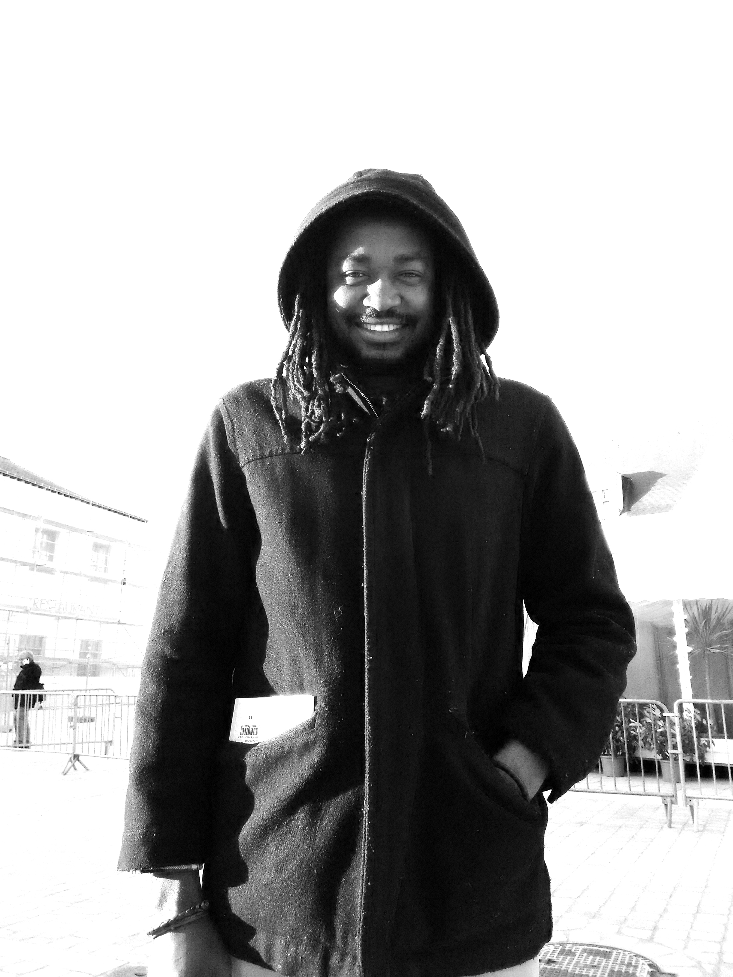 Makenzy Orcel au Festival du premier roman à Laval (France) en 2016